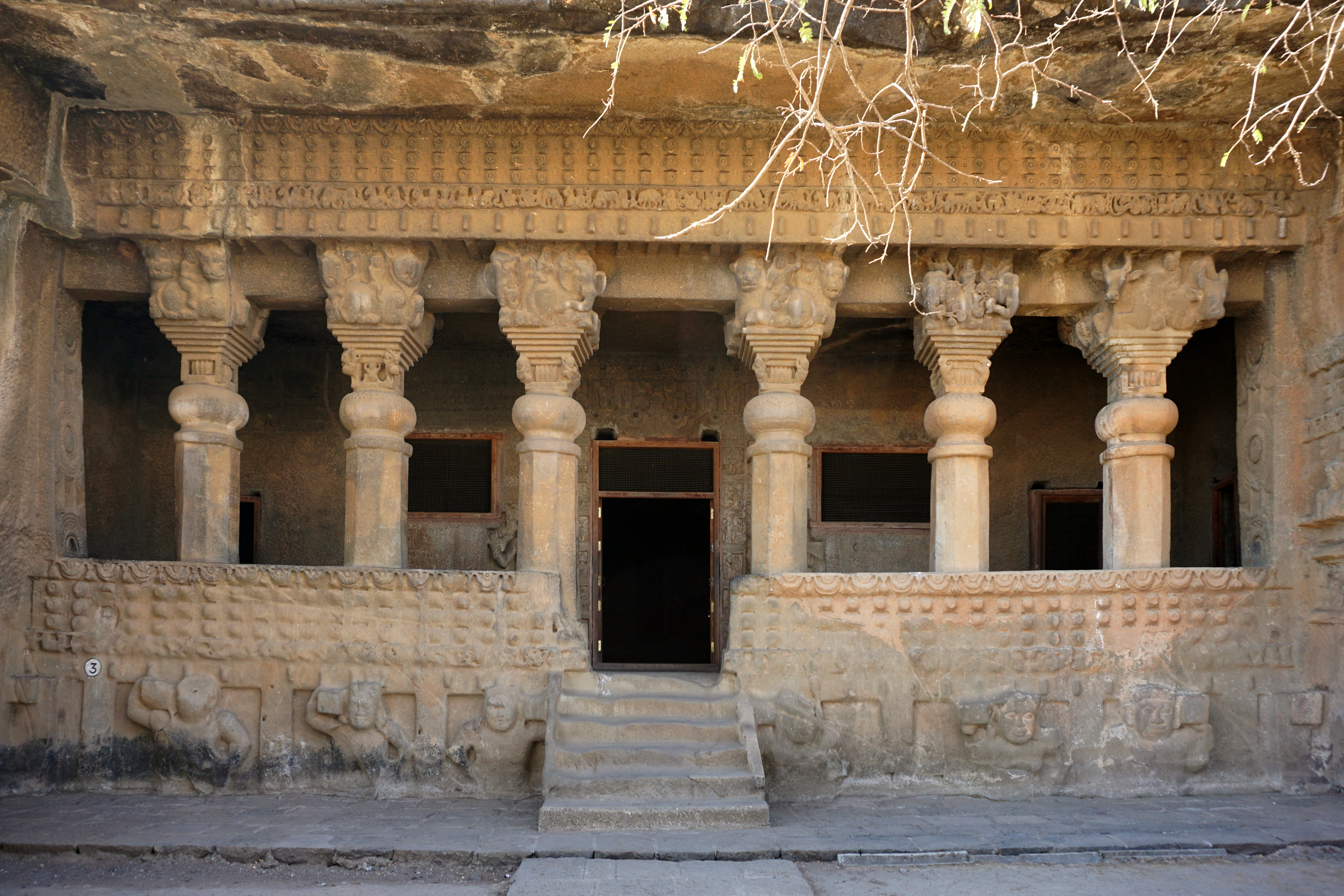 Trirasmi Caves, Nashik, India Pandavlena, Nashik, India